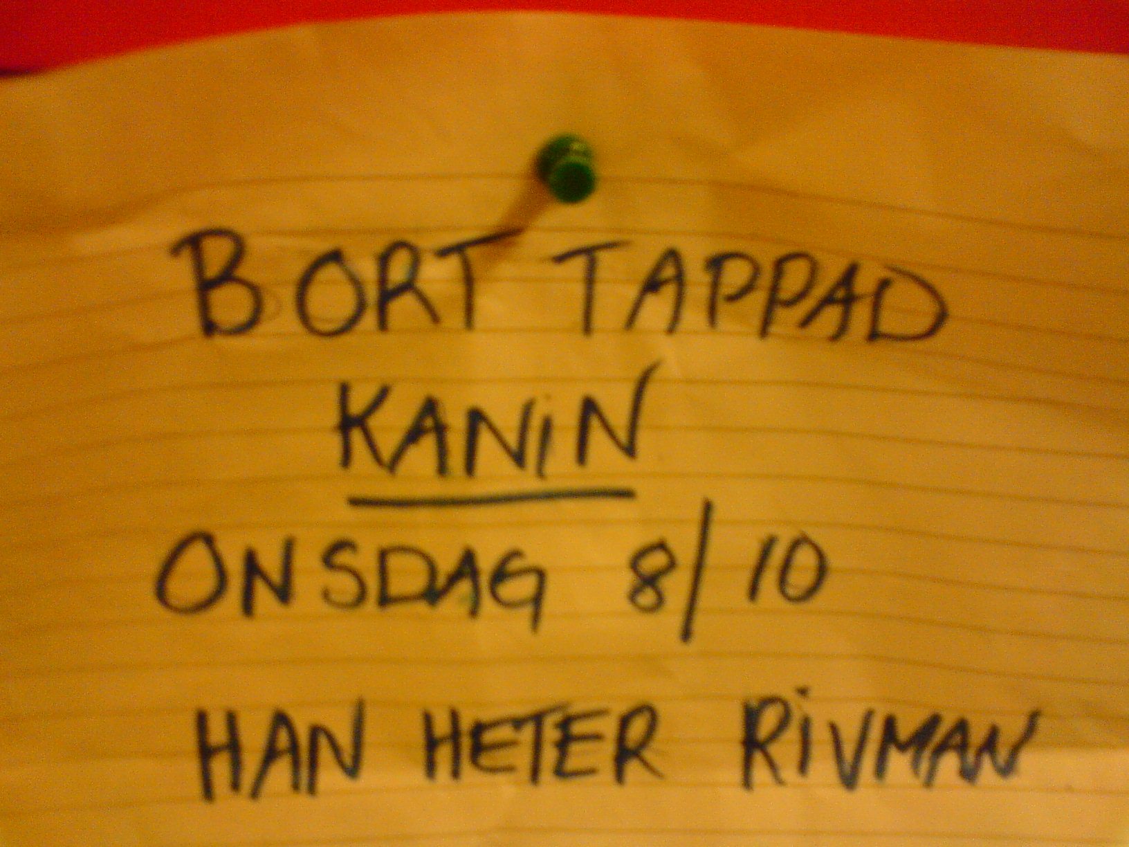 En särskriven lapp om en försvunnen kanin.